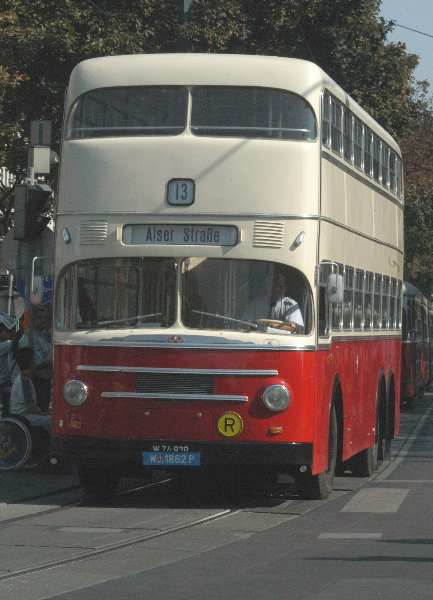 Oldtimer-Autobus in Wien, Austria. ÖAF - Gräf & Stift, Typ DD2FU, Baujahr 1961